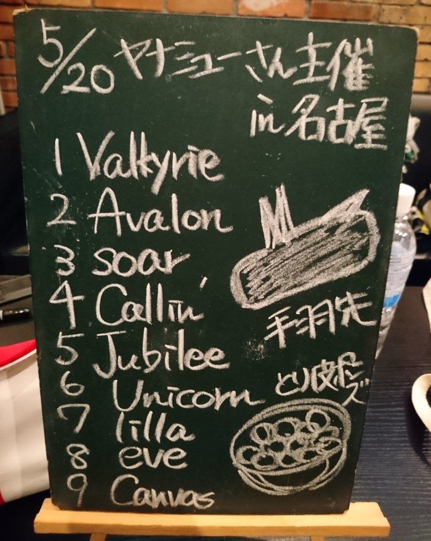 amiinAセトリボード(20180520(1))